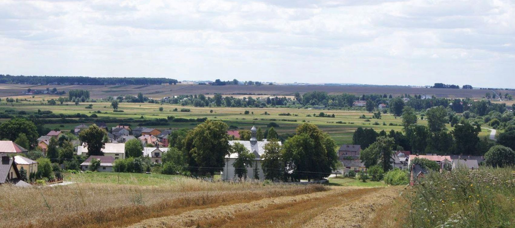 Sobków